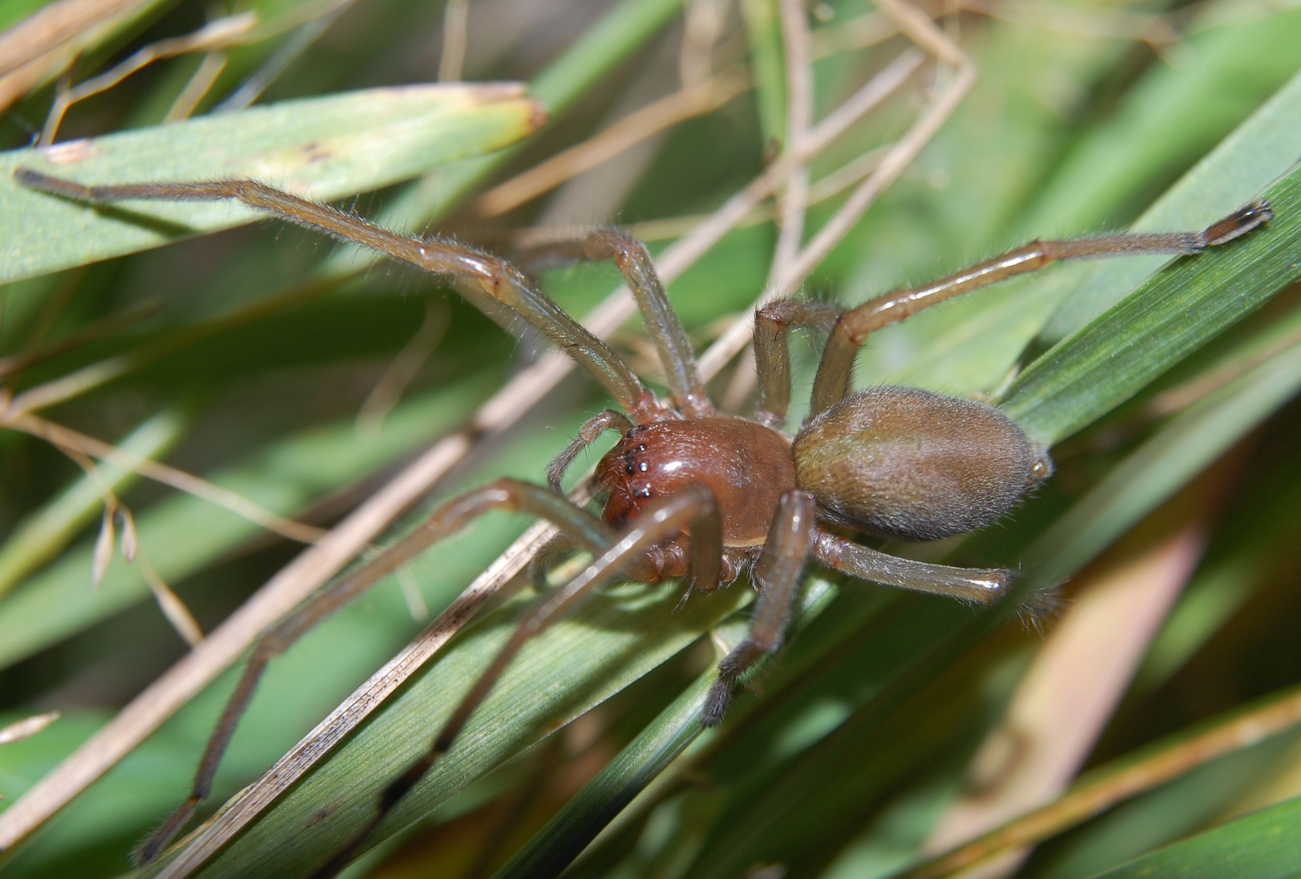 Cheiracanthium punctorium, female